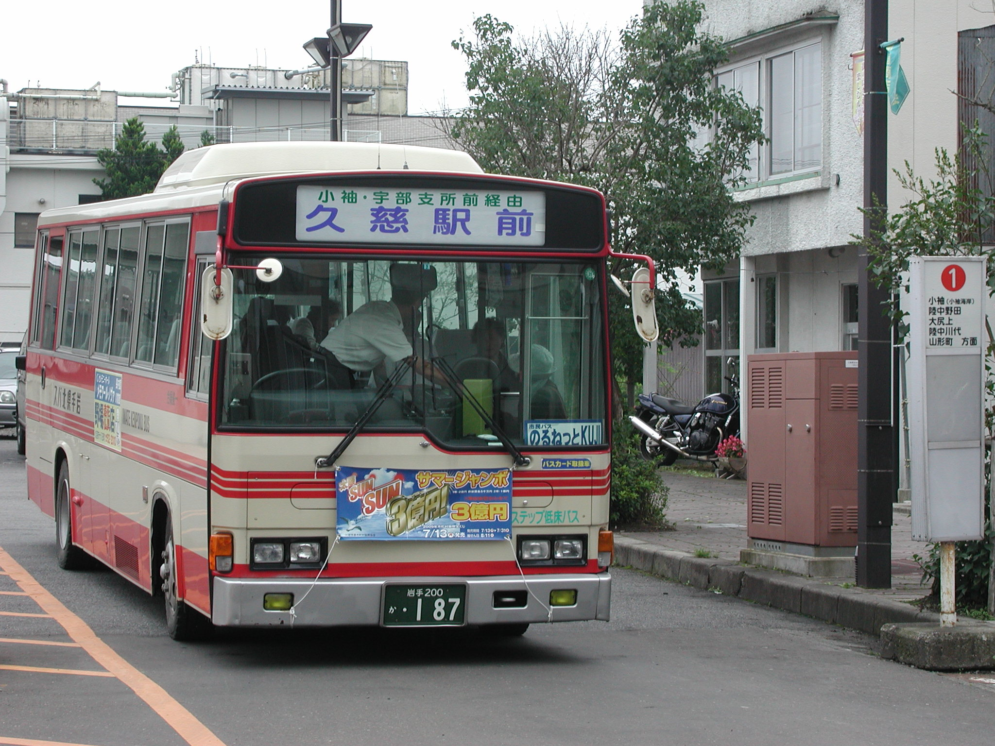 岩手県北自動車（岩手県北バス） のるねっとKUJI久慈海岸線運用 - 日野・レインボーRJ 久慈駅にて